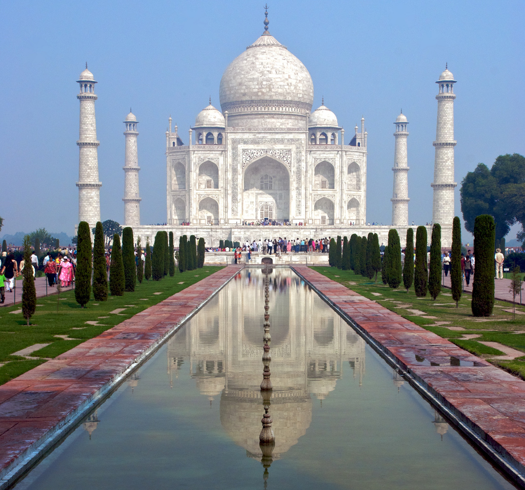 Symmetrian laki